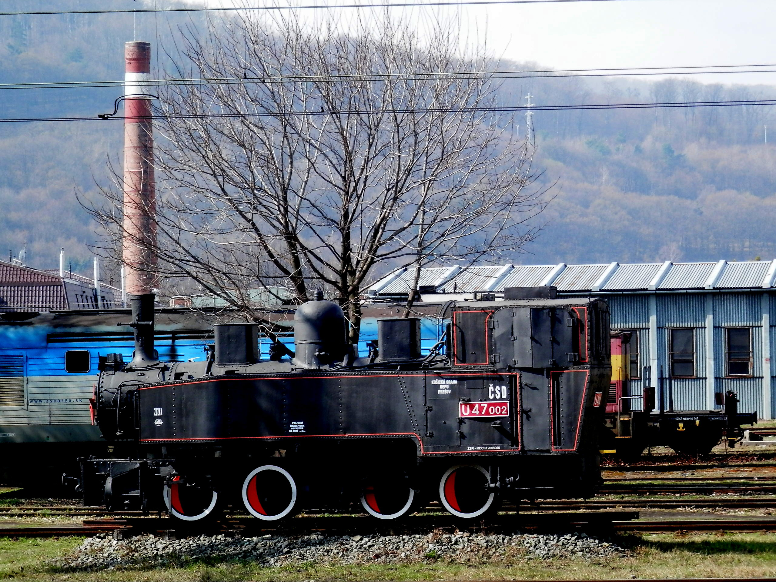 Historická parná lokomotíva v železničnom depe Prešov.